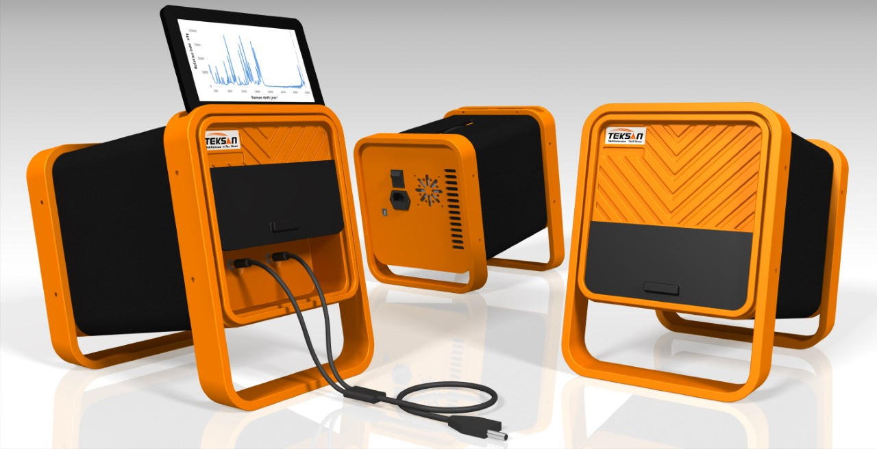 microscope